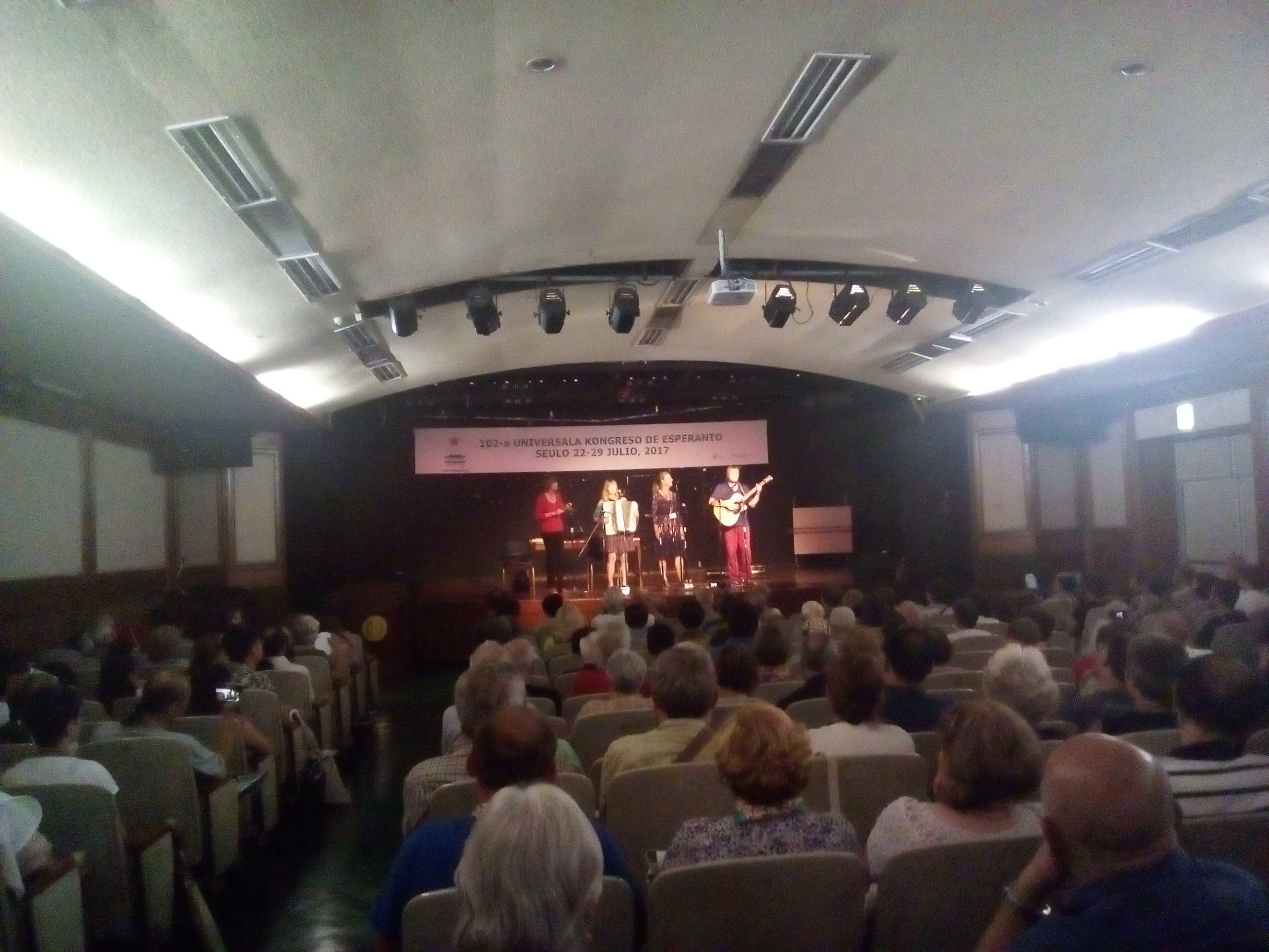 Nederlanda Esperanta muzika grupo Kajto koncertanta dum la 102a Universala koncerto de Esperanto (2017).